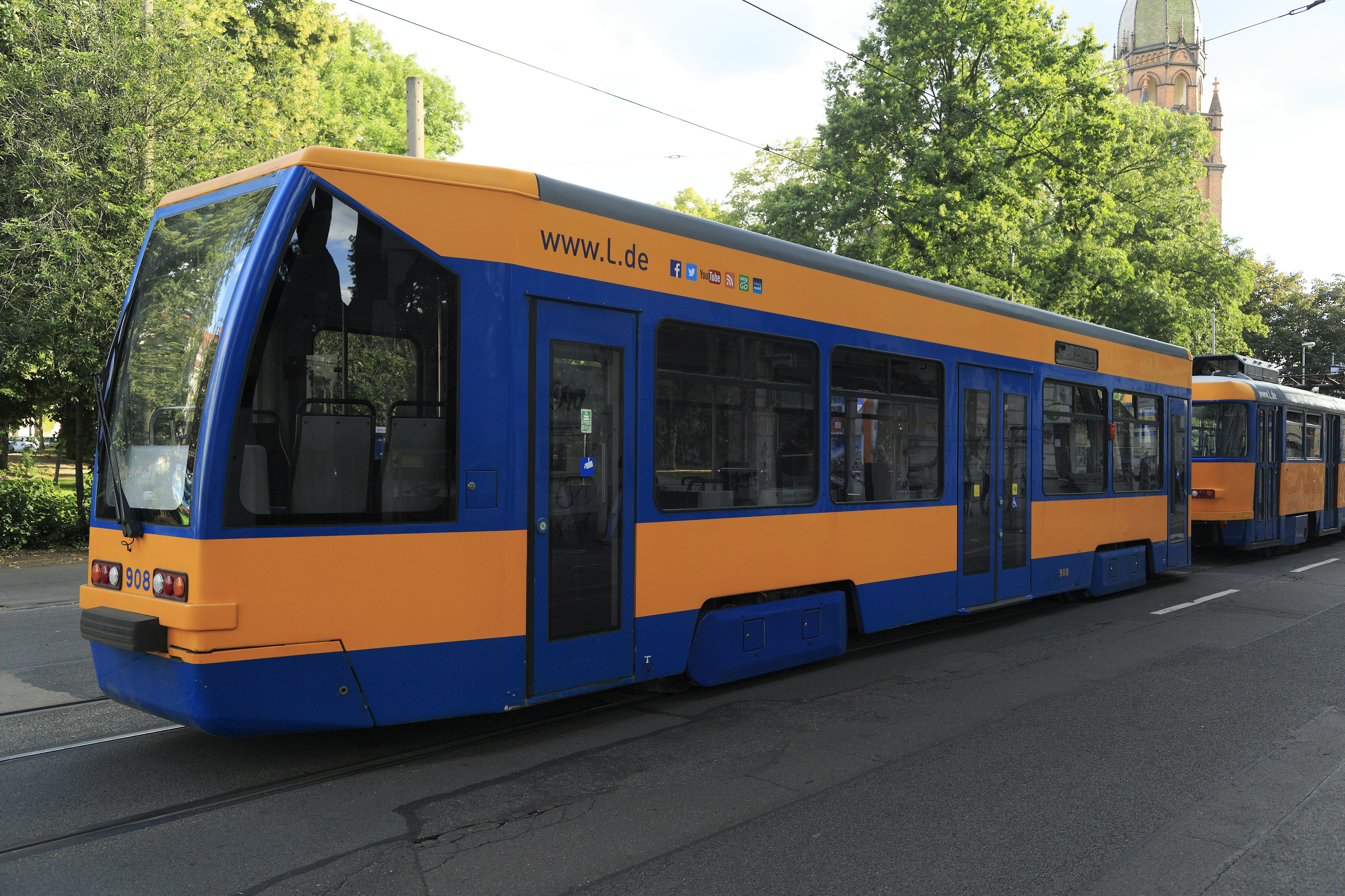 Türseite nach dem Schließen der Türen, Zug der Linie 7 nach Lausen. Dreiwagenzug mit zwei Triebwagen Typ 33c.